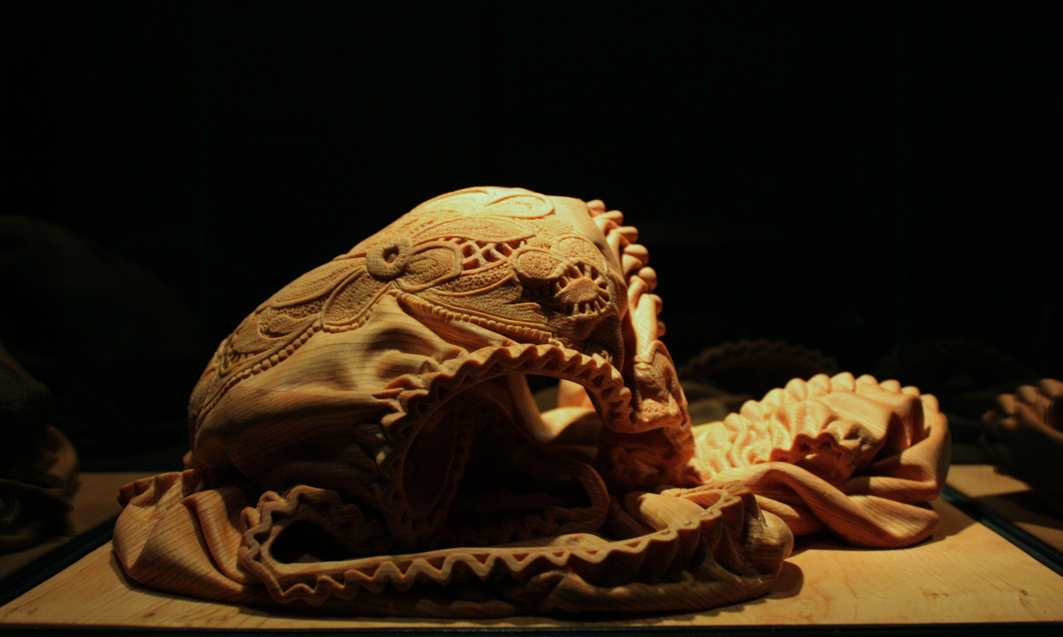 "Praeludium und Fuge" aus Zirbelkiefer, 2009, von Carsten Lewerentz